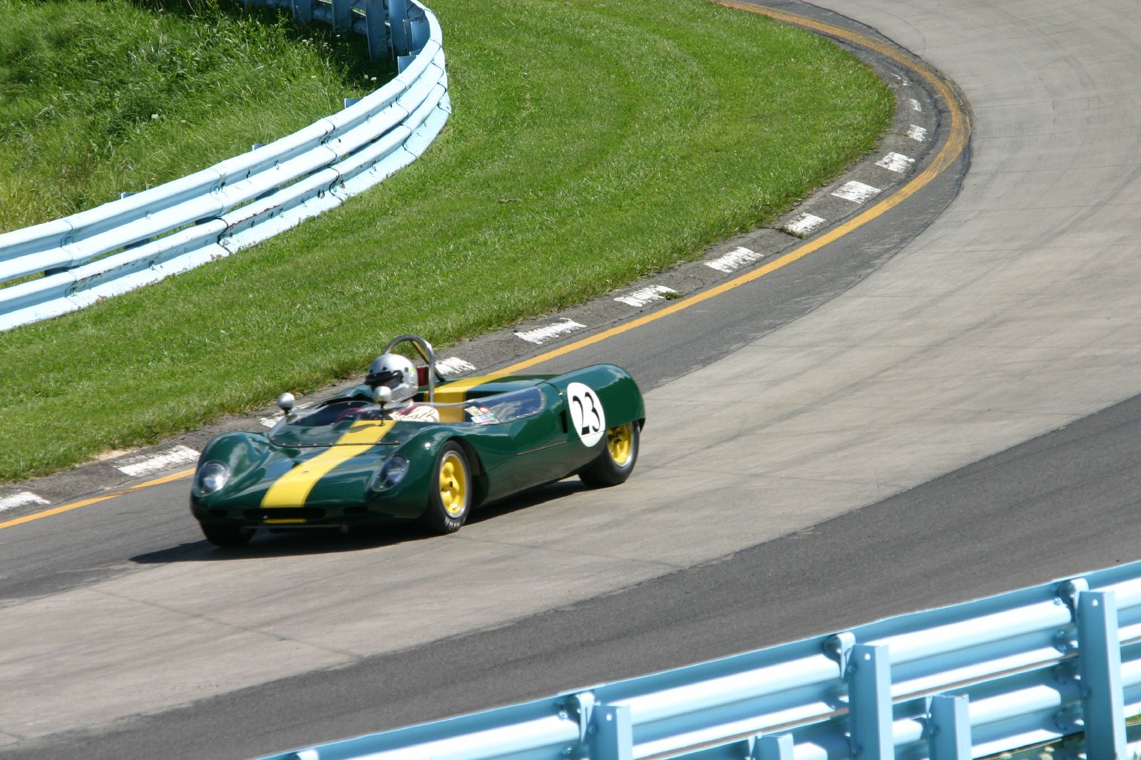 1965 Lotus 23b (1600cc)